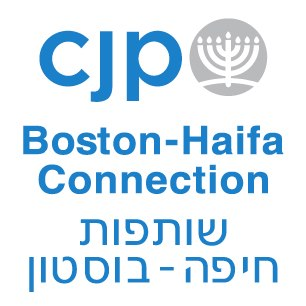 סמל שותפות חיפה בוסטון